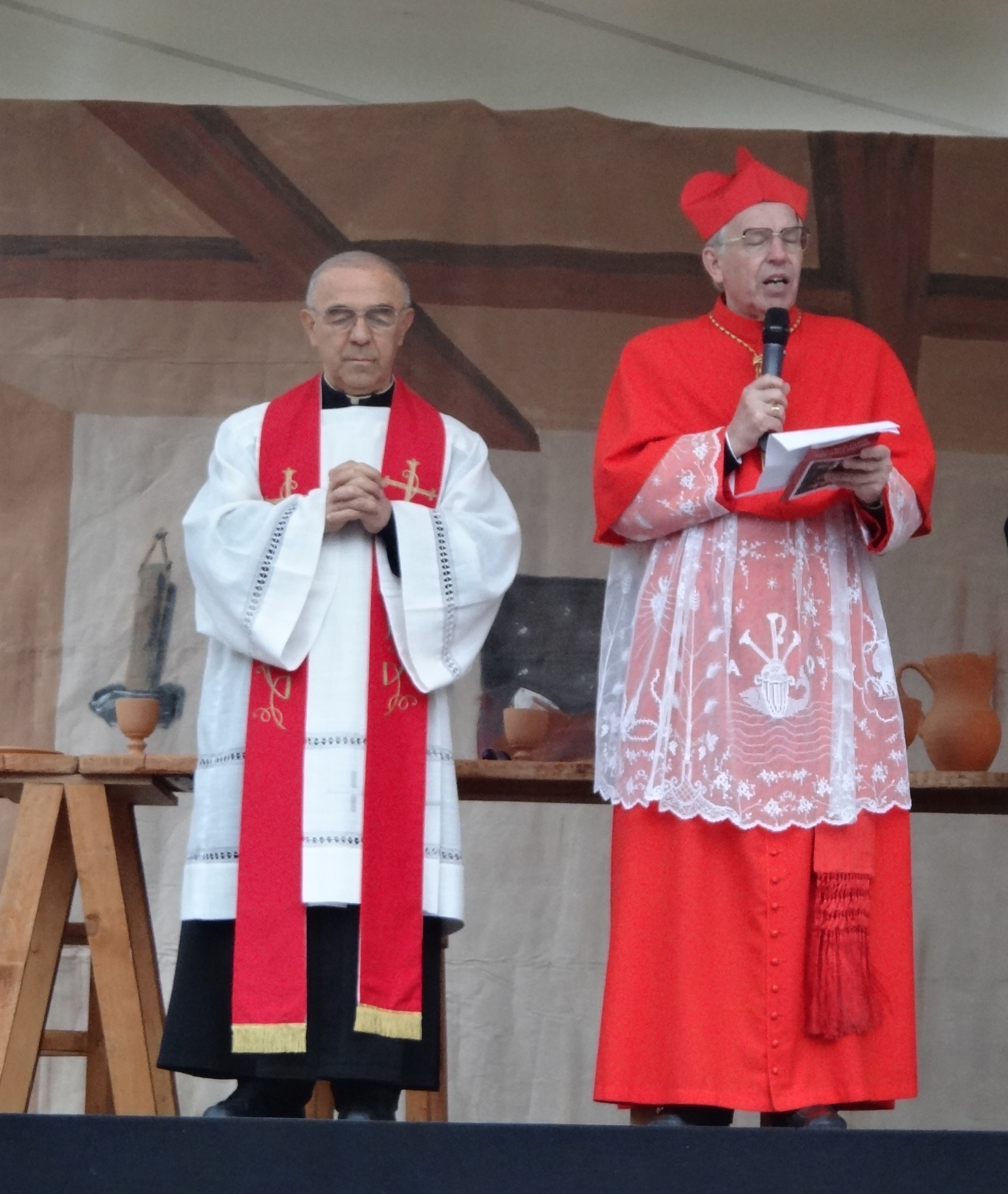 Kardinal_Giovanni_Battista_Re beim Lebendigen Kreuzweg 2013 in Neu-Ulm